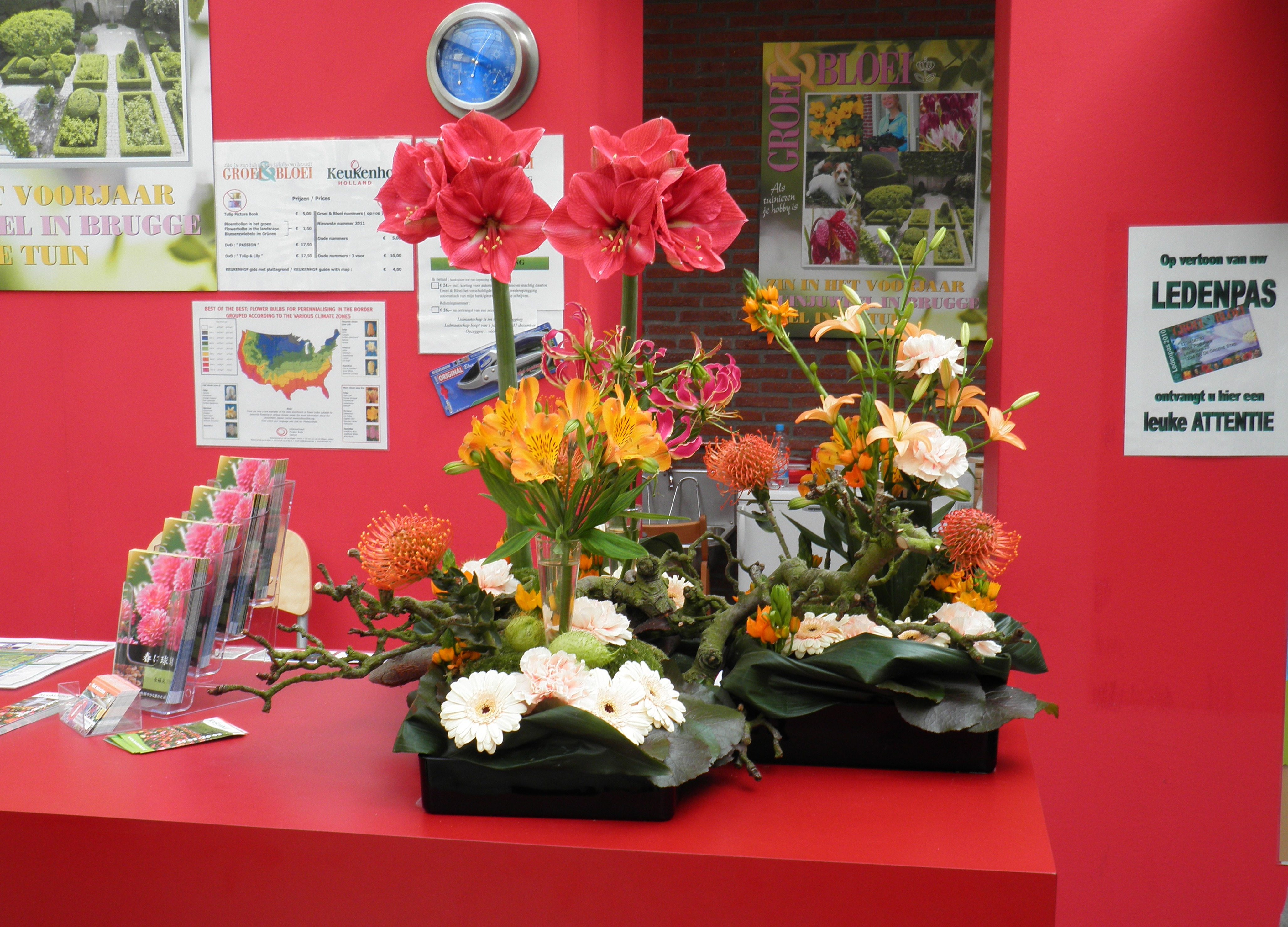 טיול לארצות השפלה תערוכת הפרחים בקוקנהוף הולנד